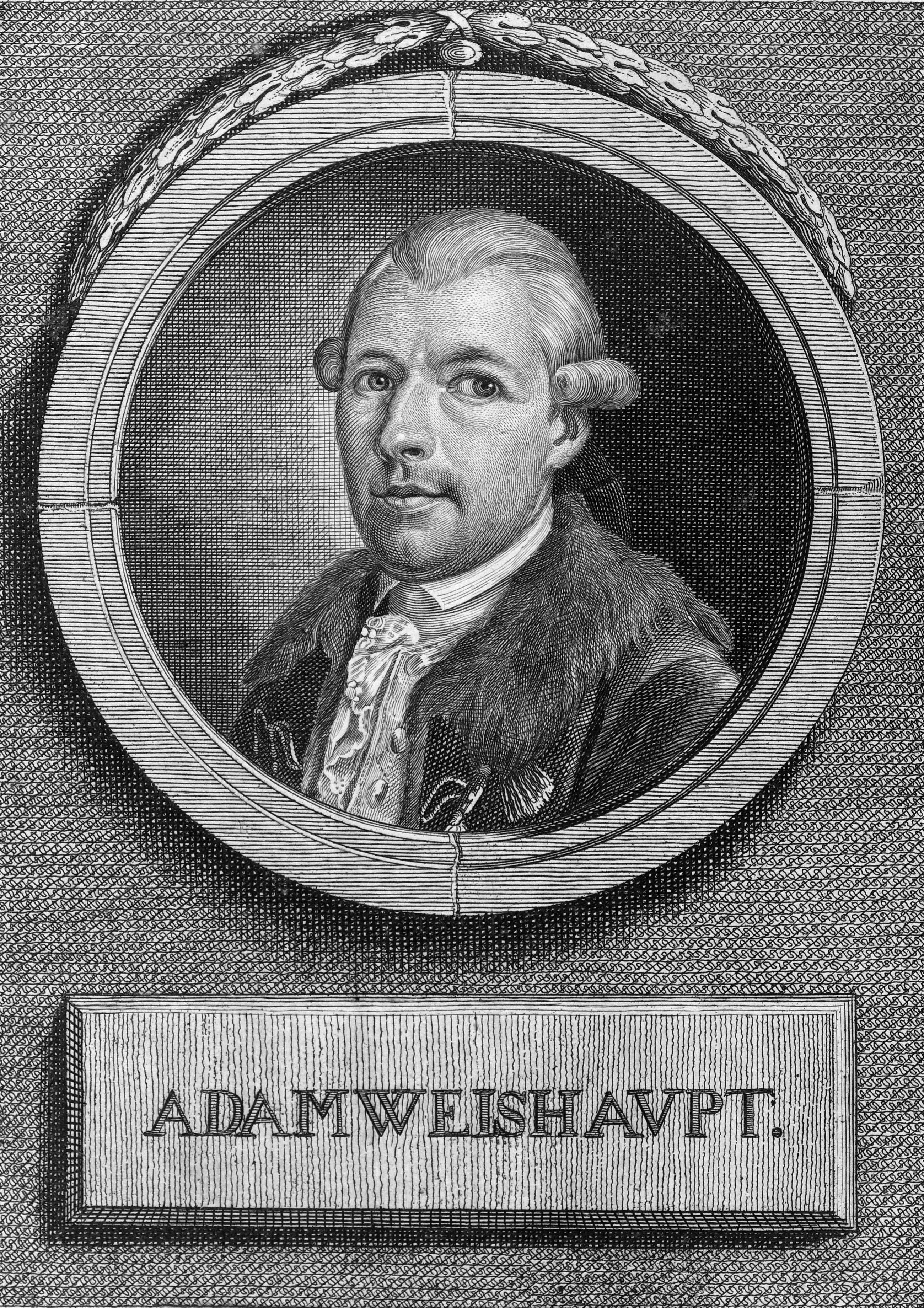 Adam Weishaupt, , Copyleft